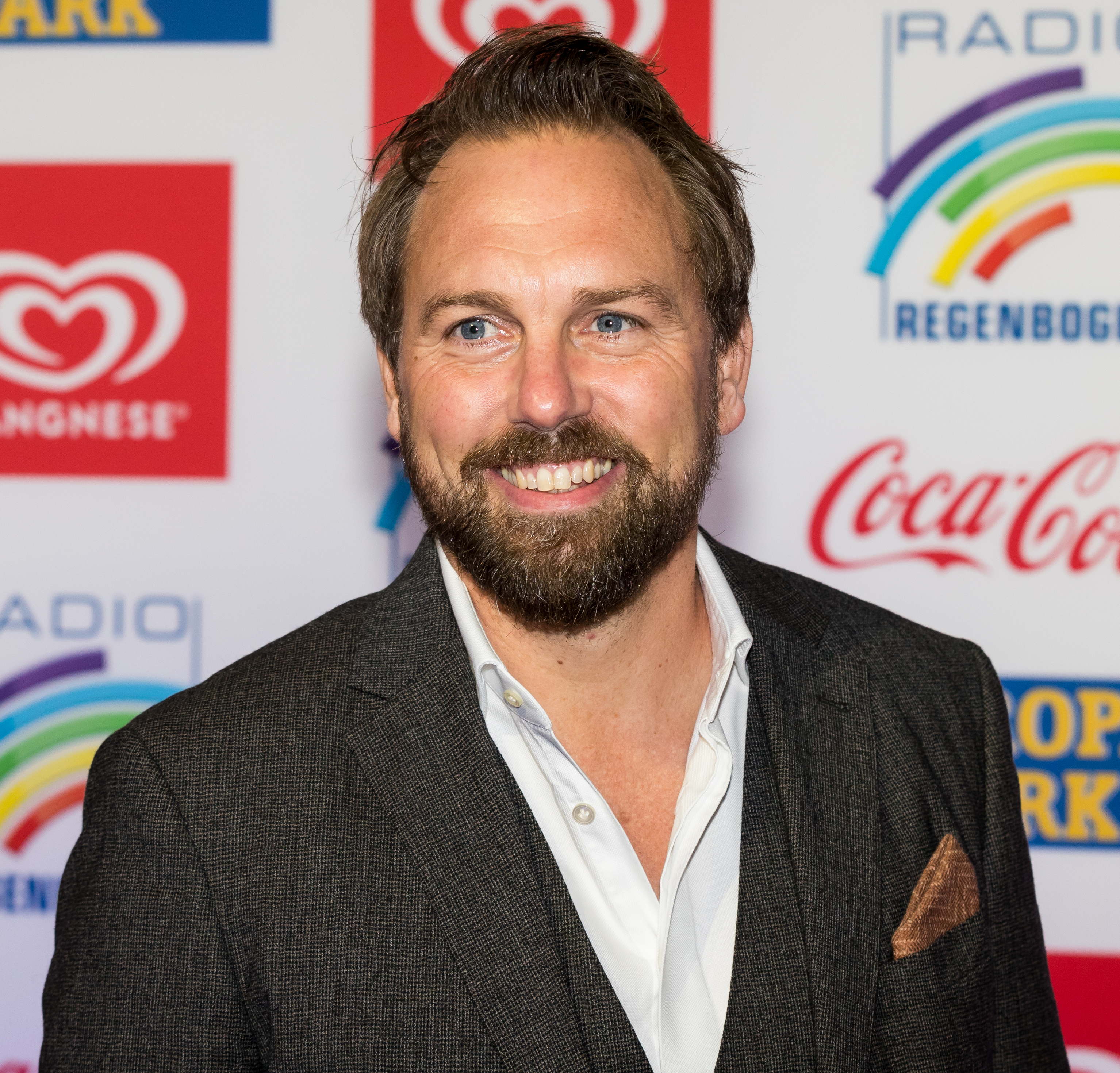 during Radio Regenbogen Award 2018 at Europapark, Rust, Baden-Württemberg, Germany on 2018-03-23, Photo: Sven Mandel